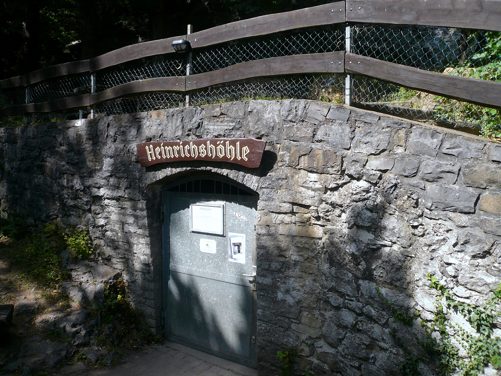 Heinrichshöhle